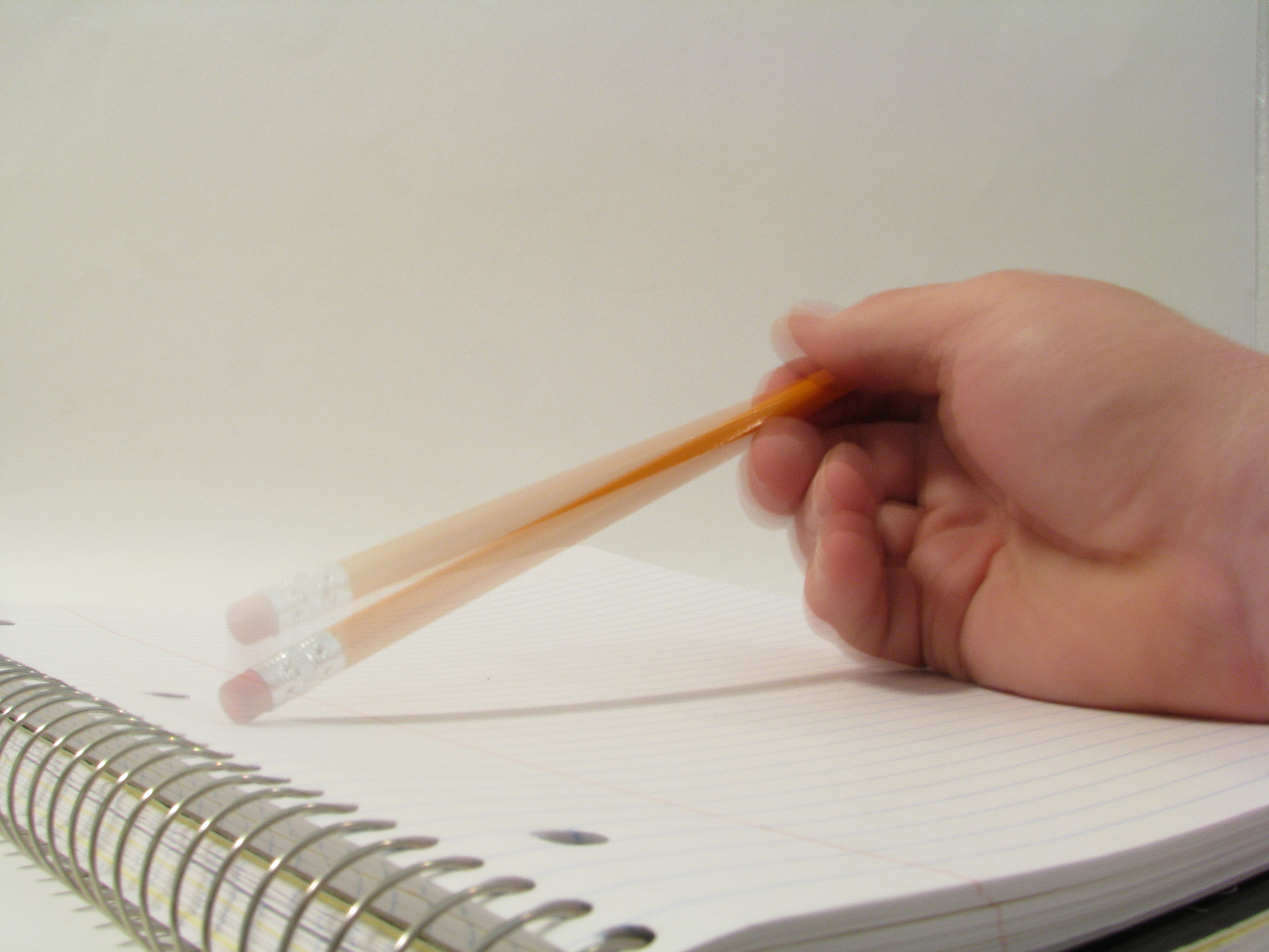 Tapping a Pencil